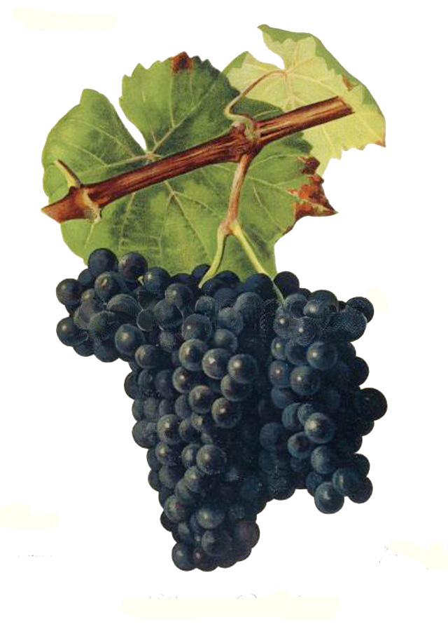 Cépage Alicante Bouschet par Viala et Vermorel